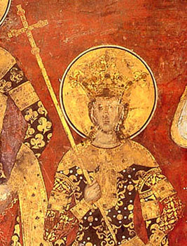 Stefan Uros V(nejaki)